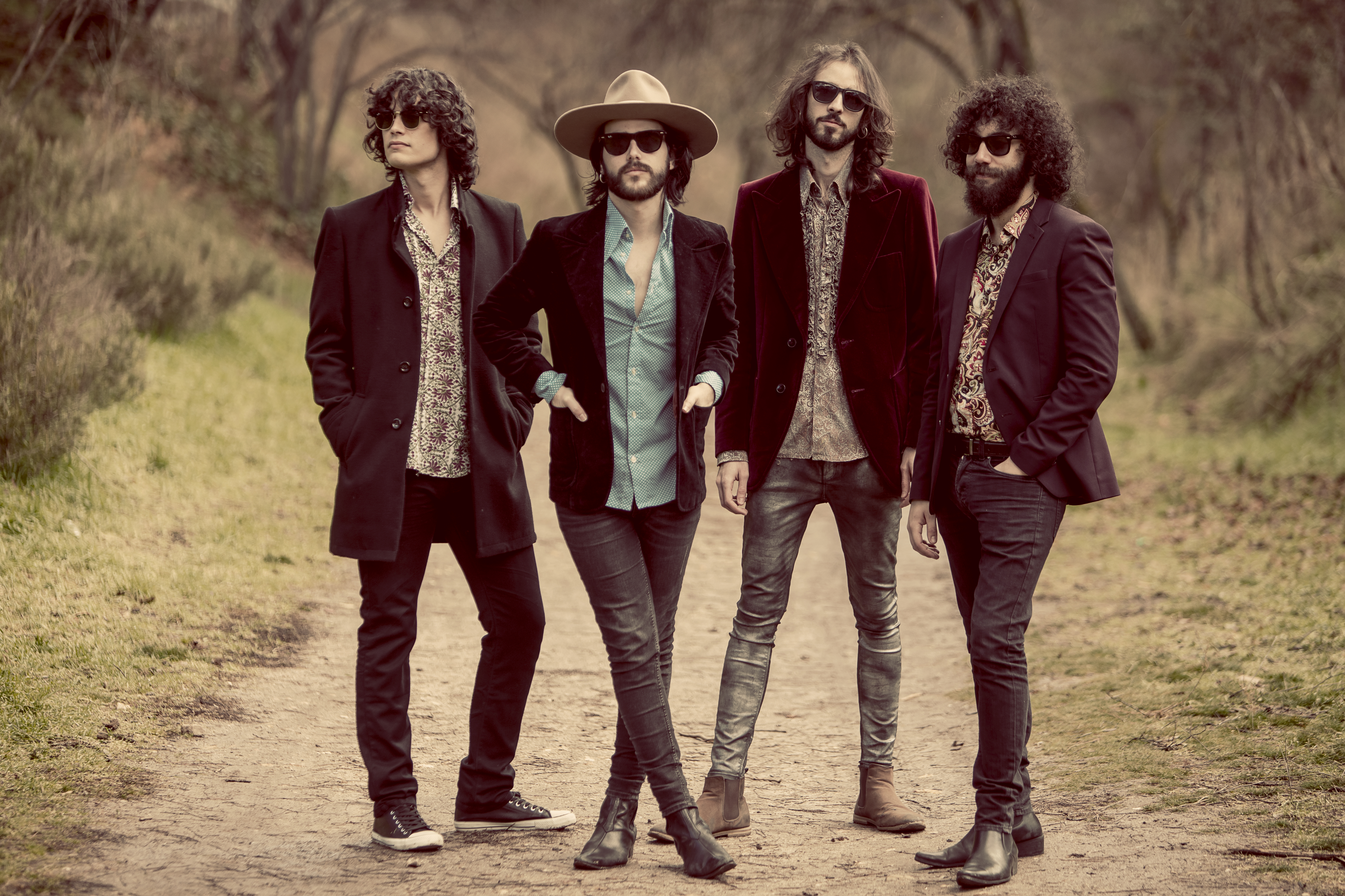 Foto de la banda Atraco